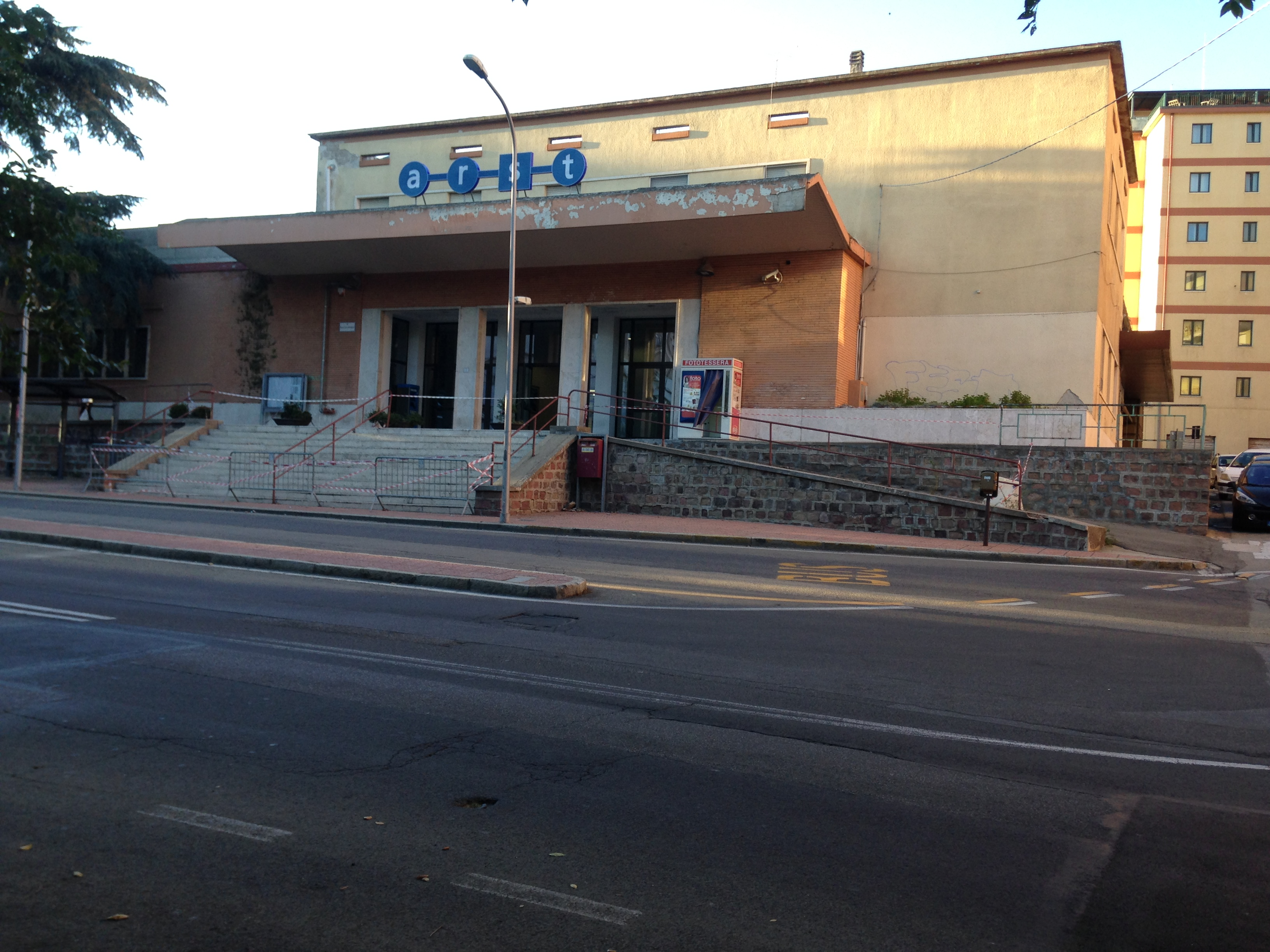 l'ingresso principale di via Lamarmora alla stazione dei treni